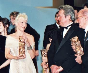 Tonie Marshall, Alain Delon et Georges Cravenne à la cérémonie des Césars.